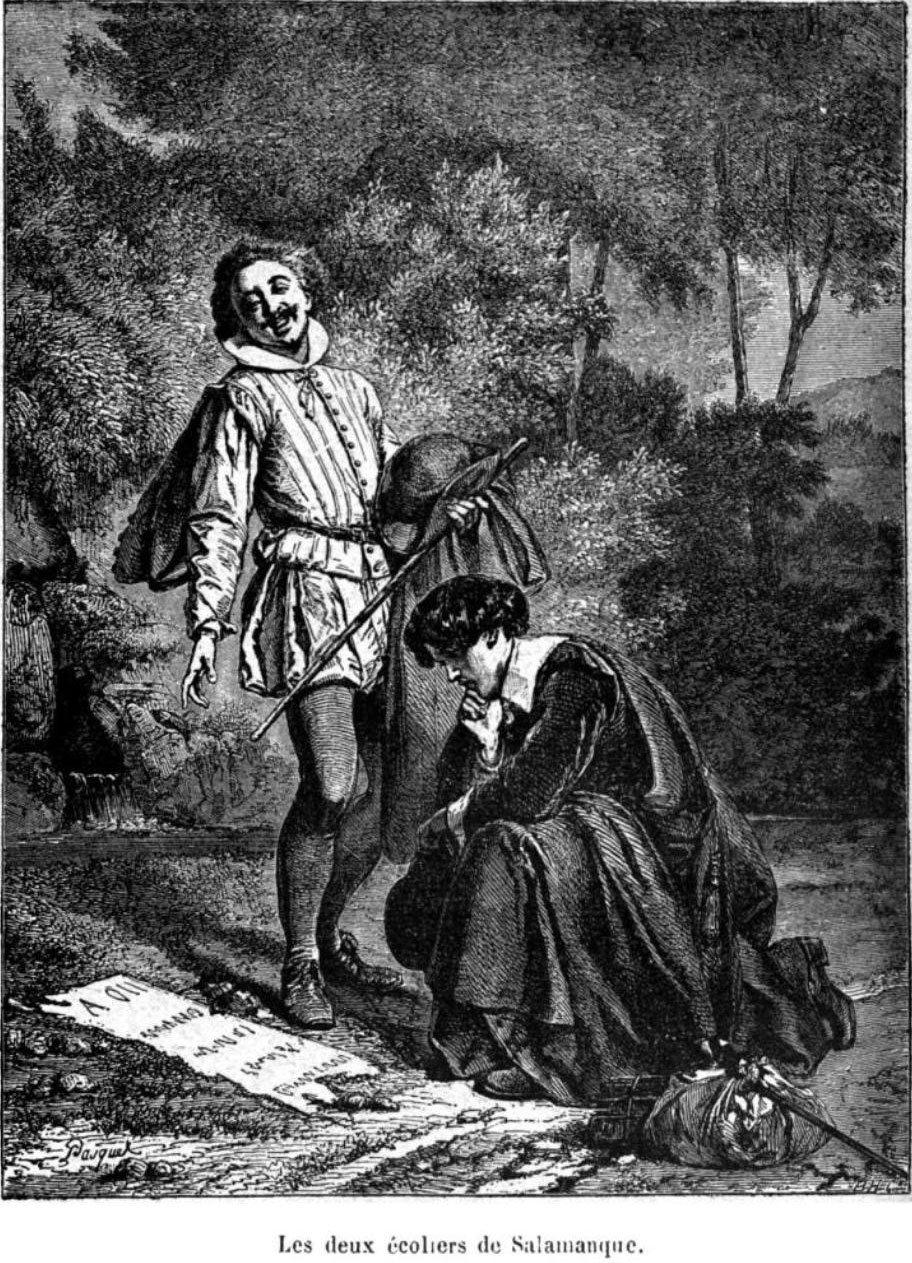 Alain-René Lesage's bachelors of Salamanca discover Pedro Garcias' gravestone in Histoire de Gil Blas de Santillane: Aqui esta encerrada el alma del licenciado Pedro Garcias.